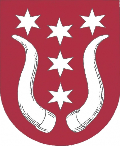 znak, Mačkov, okres Strakonice